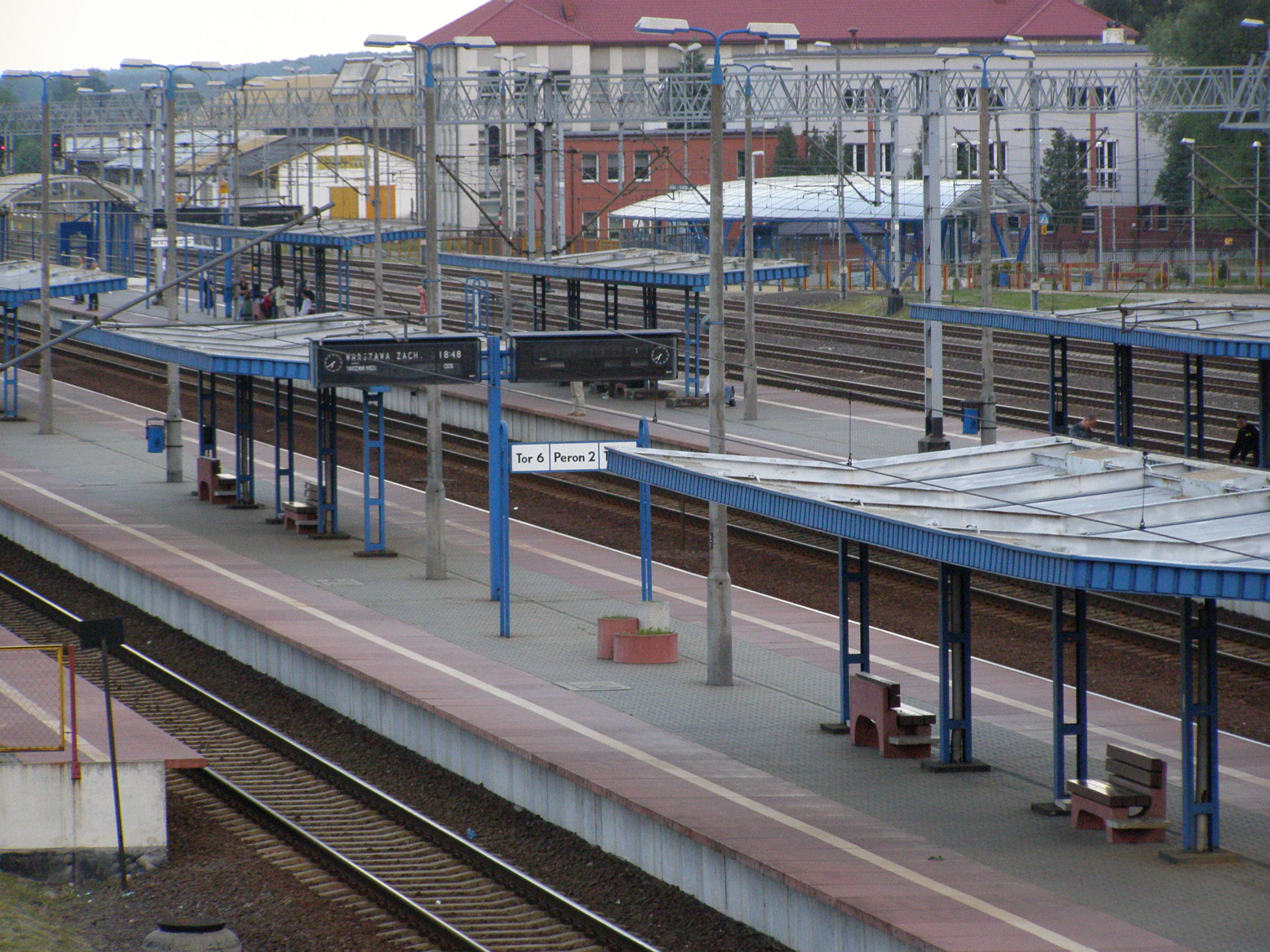 Train Station in Mińsk Mazowiecki